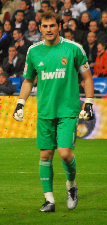 La Liga: Real Madrid 2 - Atletico 0 7 de Noviembre 2010